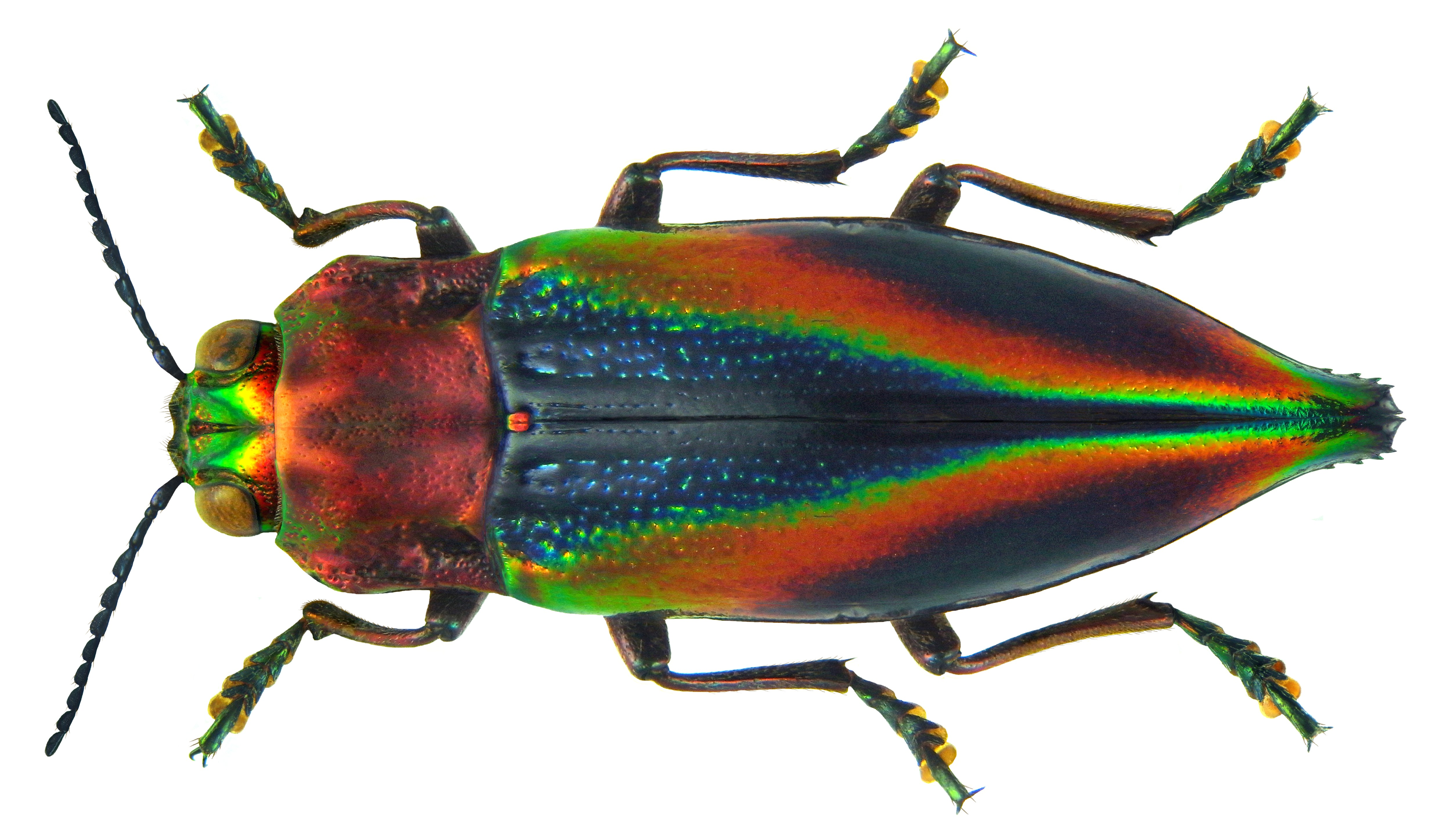 Familie: Buprestidae Groesse: 23 mm Fundort: Indonesien, Irian Jaya, Kei Islands, Tual City, Ohoidertawun leg. A.Skale, 2011; det. U.Schmidt, 2011 Photo: U.Schmidt, 2011